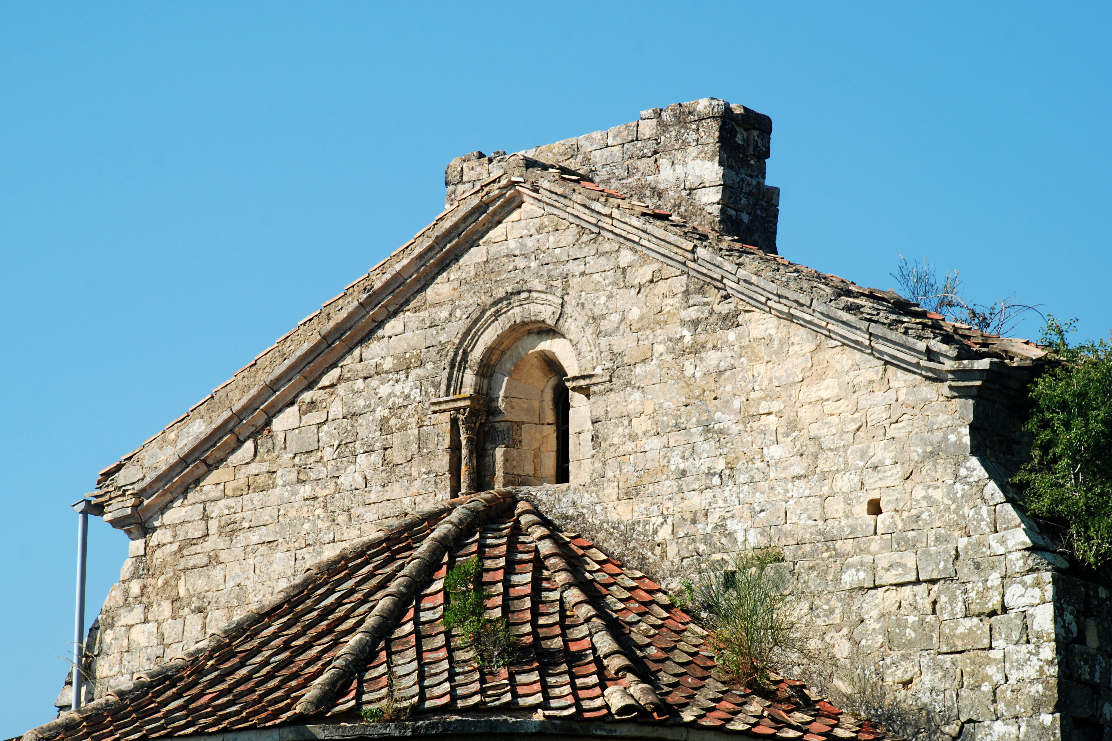 France - Gard - Bagnols-sur-Cèze - Chapelle Saint-Martin-de-Saduran